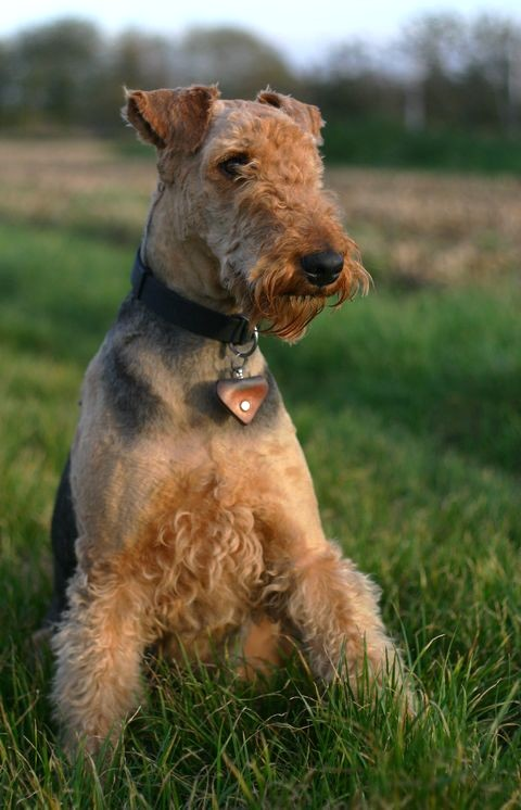 Airedale TerrierModel